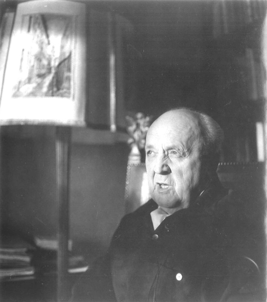 Der Radiopionier Alfred Braun in einer Porträtaufnahme des Berliner Fotografen Werner Bethsold (*1925) Mitte der 70er Jahre.